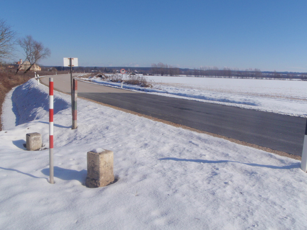 Grenzübergang Pernau